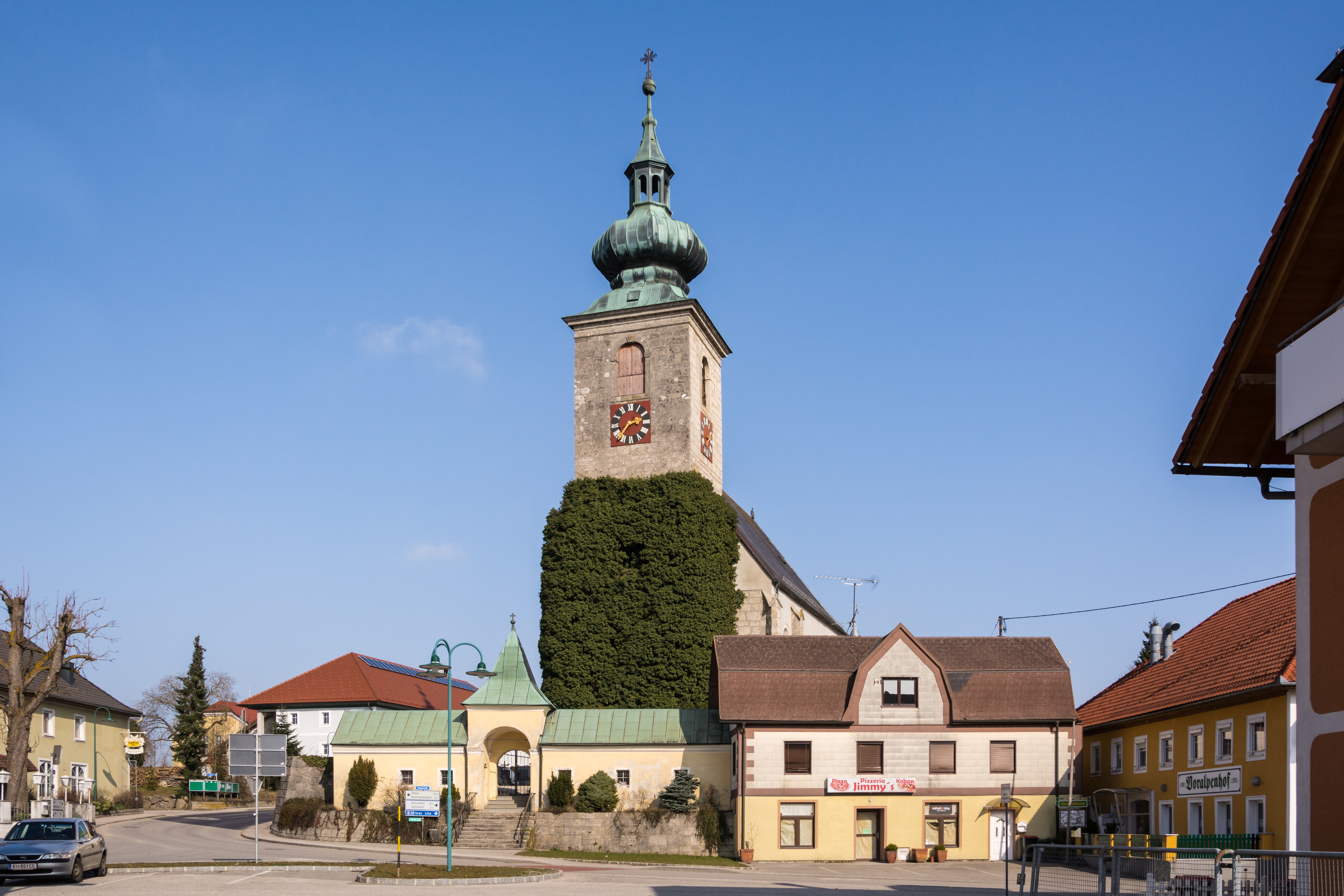 Der Efeustock (Hedera helix) bewächst den Kirchturm der Kirche von Ried im Traunkreis This media shows the natural monument in Upper Austria with the ID nd256.